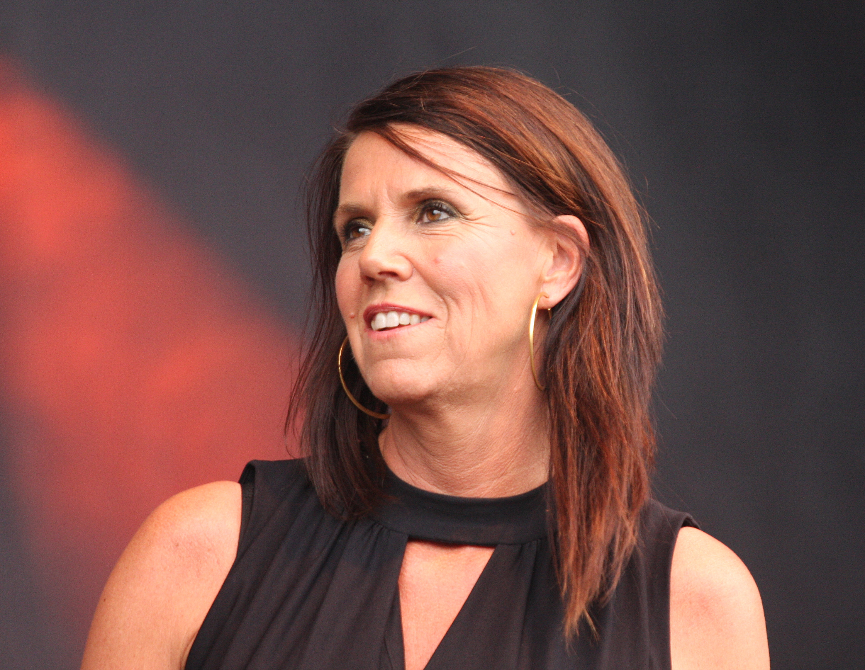 Hanne Boel